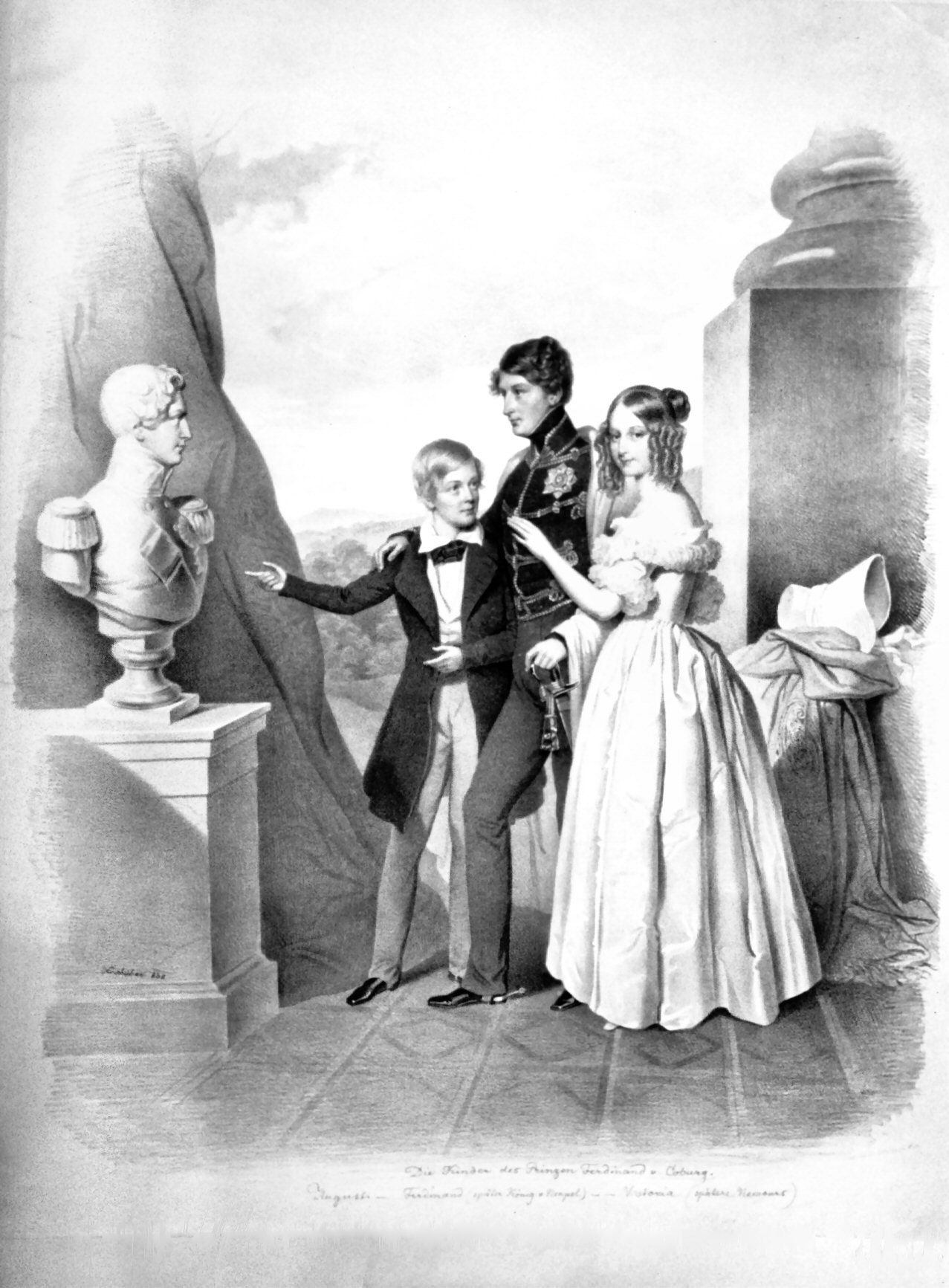 Die Kinder (Ferdinand II., August, Viktoria) Herzog Ferdinands von Sachsen-Coburg-Gotha, Lithographie von Josef Kriehuber, 1838